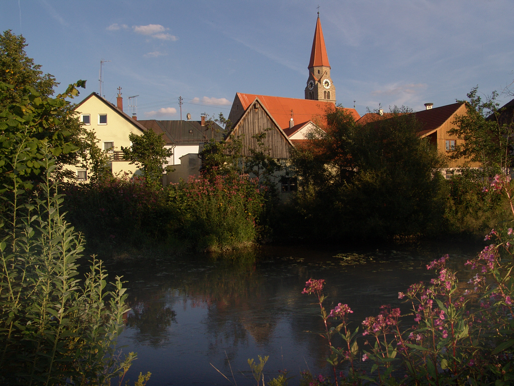 Falkenberg (Oberpfalz) Blick auf die Pfarrkirche. Im Vordergrund das Flüsschen Waldnaab.